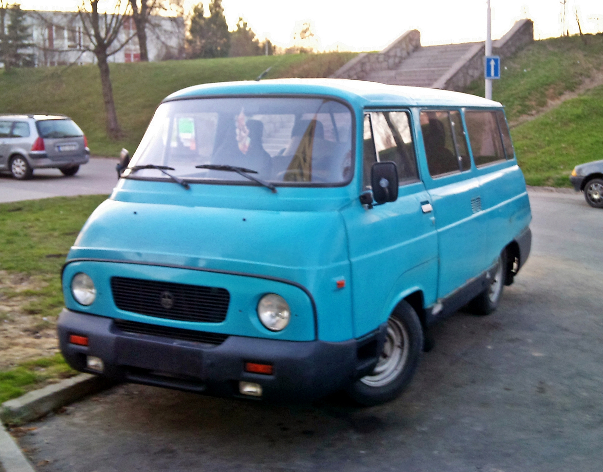 TAZ 1500 von vorne